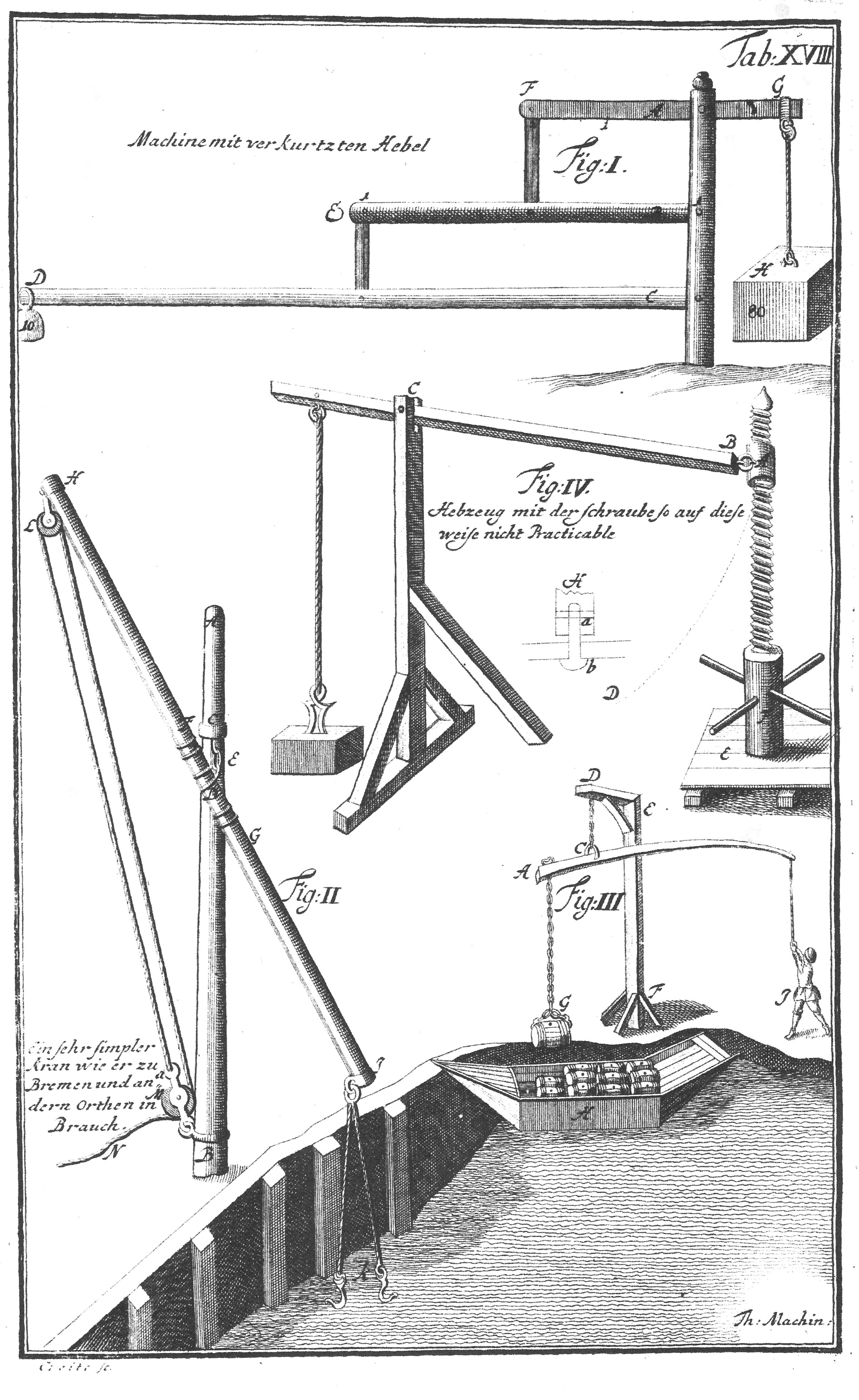 Wippe und andere Hebezeuge aus: J.Leupold, Theatrum machinarum, Schauplatz der Hebezeuge, Leipzig 1725, Tab. 15